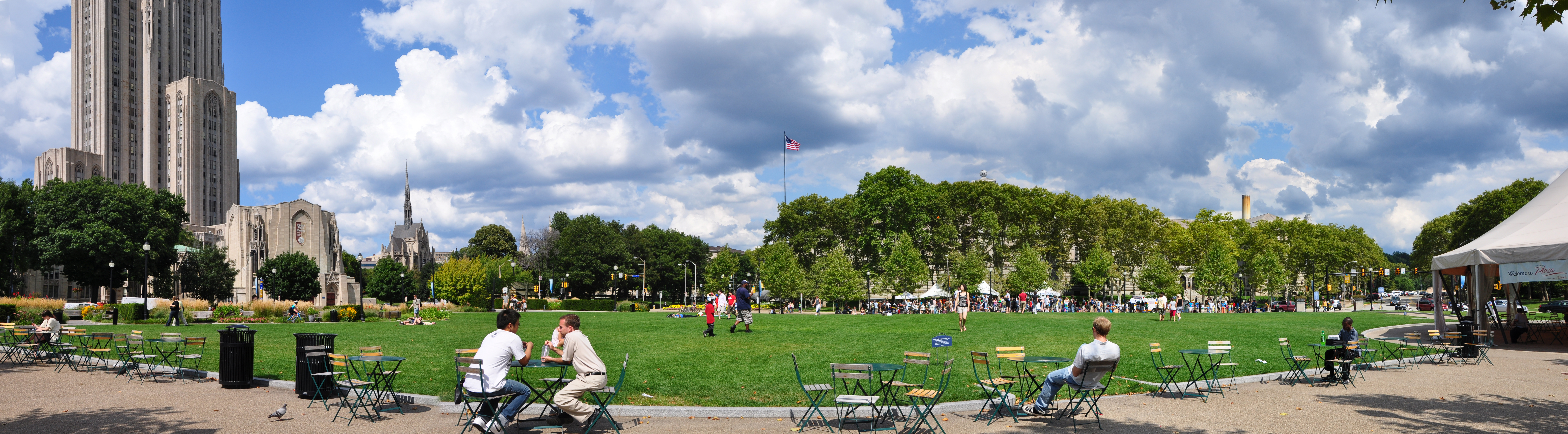 Pogopalooza '09